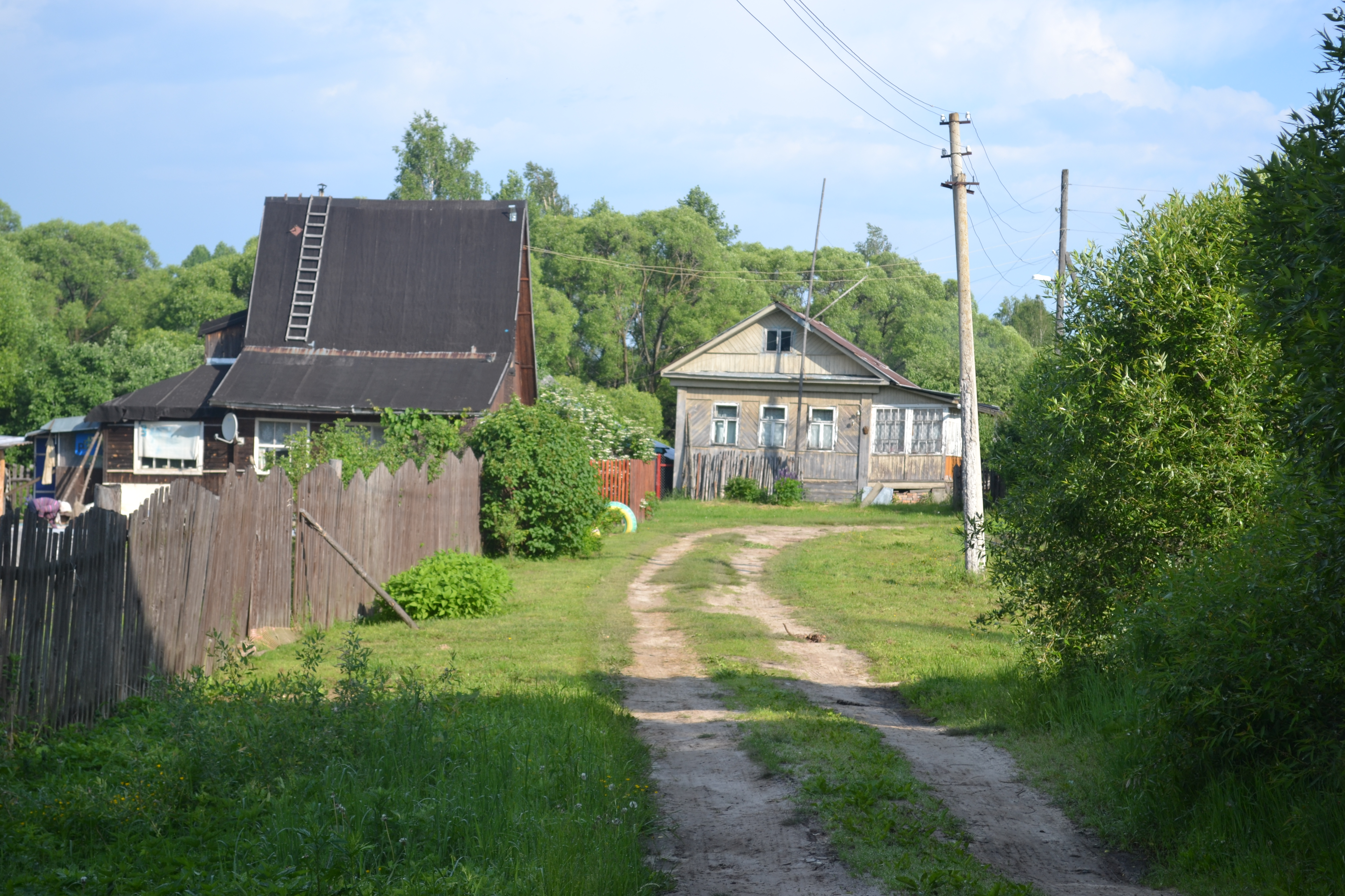 Въезд в деревню Семёновская (Пышлицкое сельское поселение)